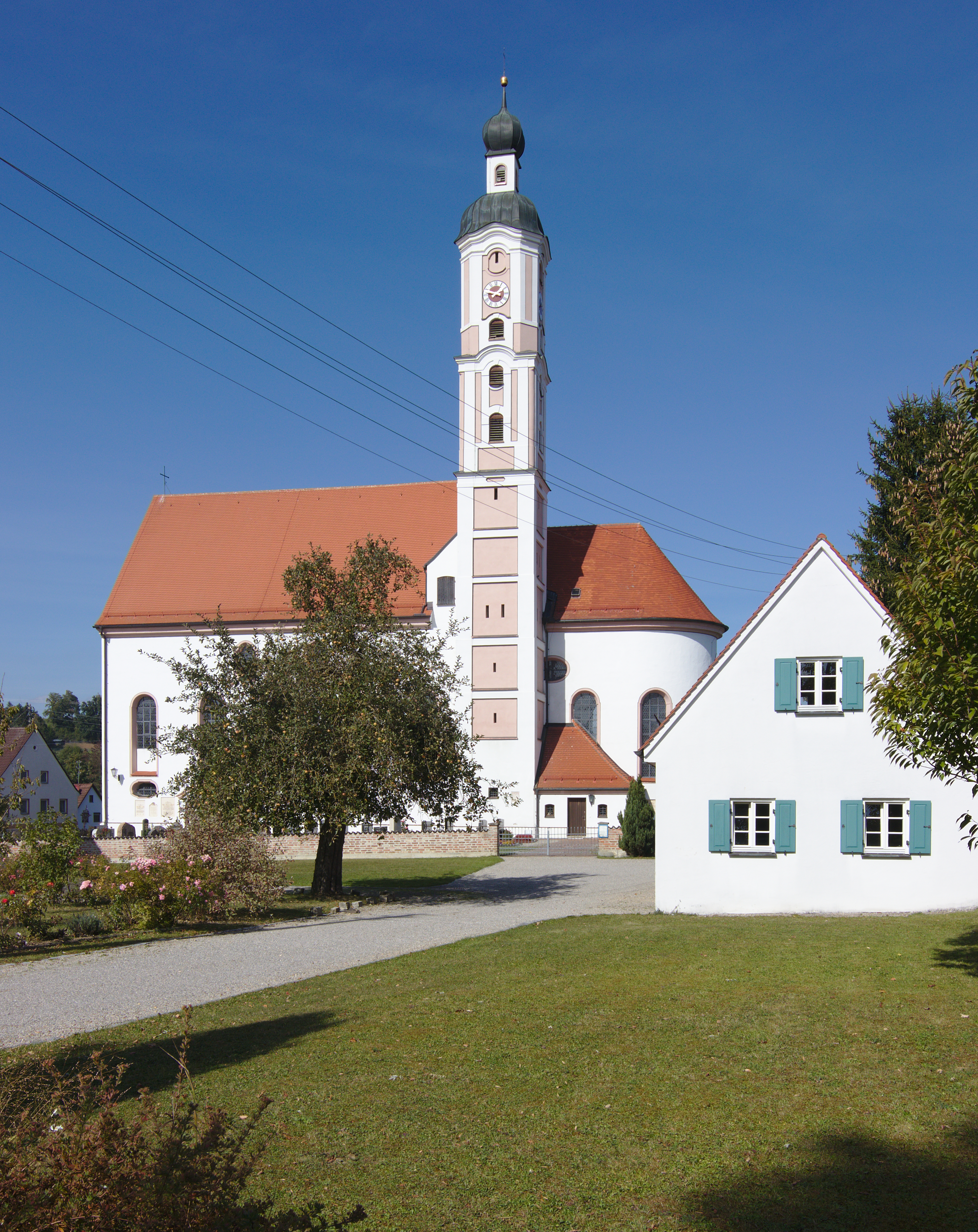 Kath. Pfarrkirche St. Martin in Gabelbach, Gemeinde Zusmarshausen. Saalbau mit eingezogenem Chor und südlichem Turm mit welscher Haube und Laterne mit Zwiebelhaube,This is a photograph of an architectural monument.